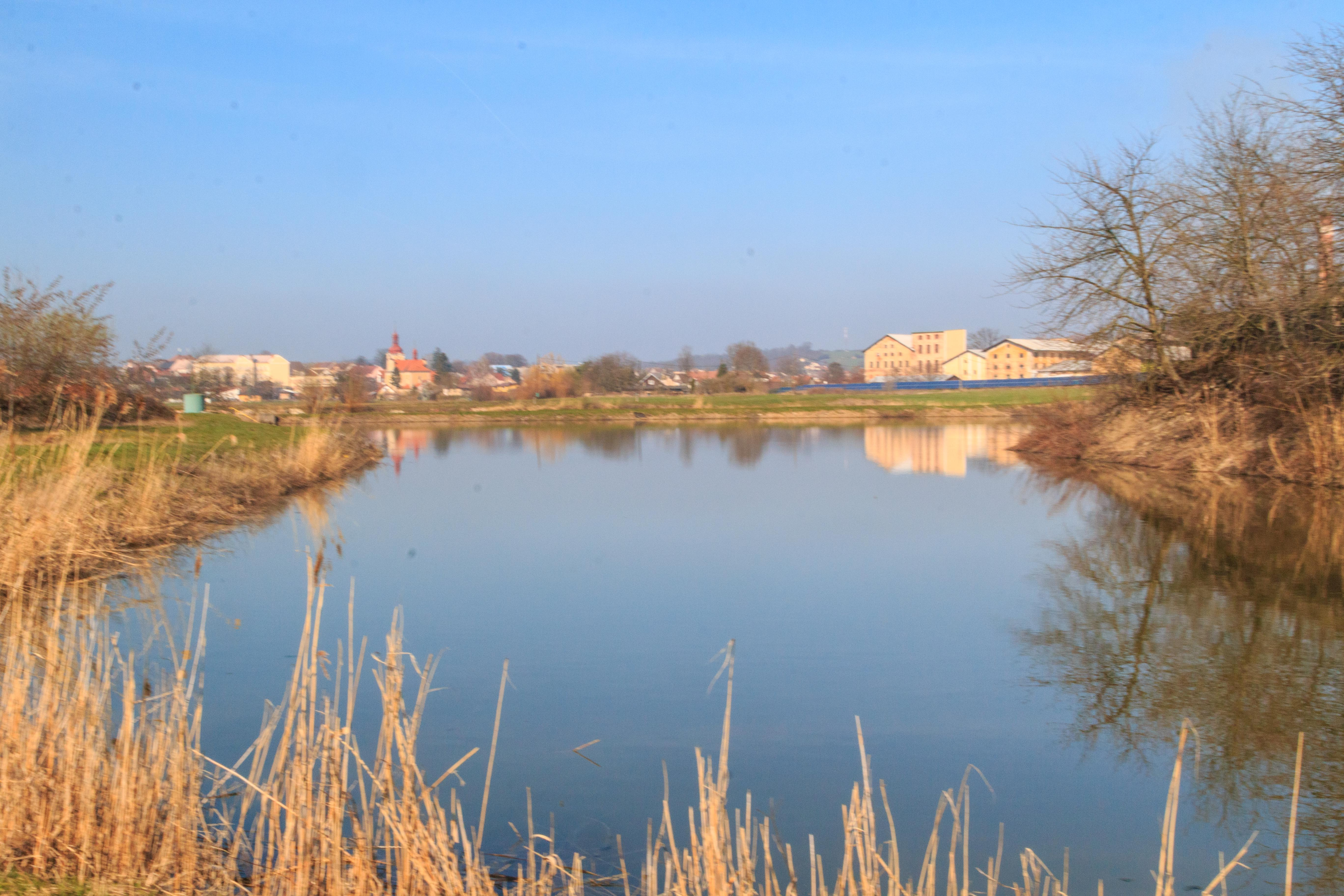 skupina rybníčků Na rybničkách u Libáně